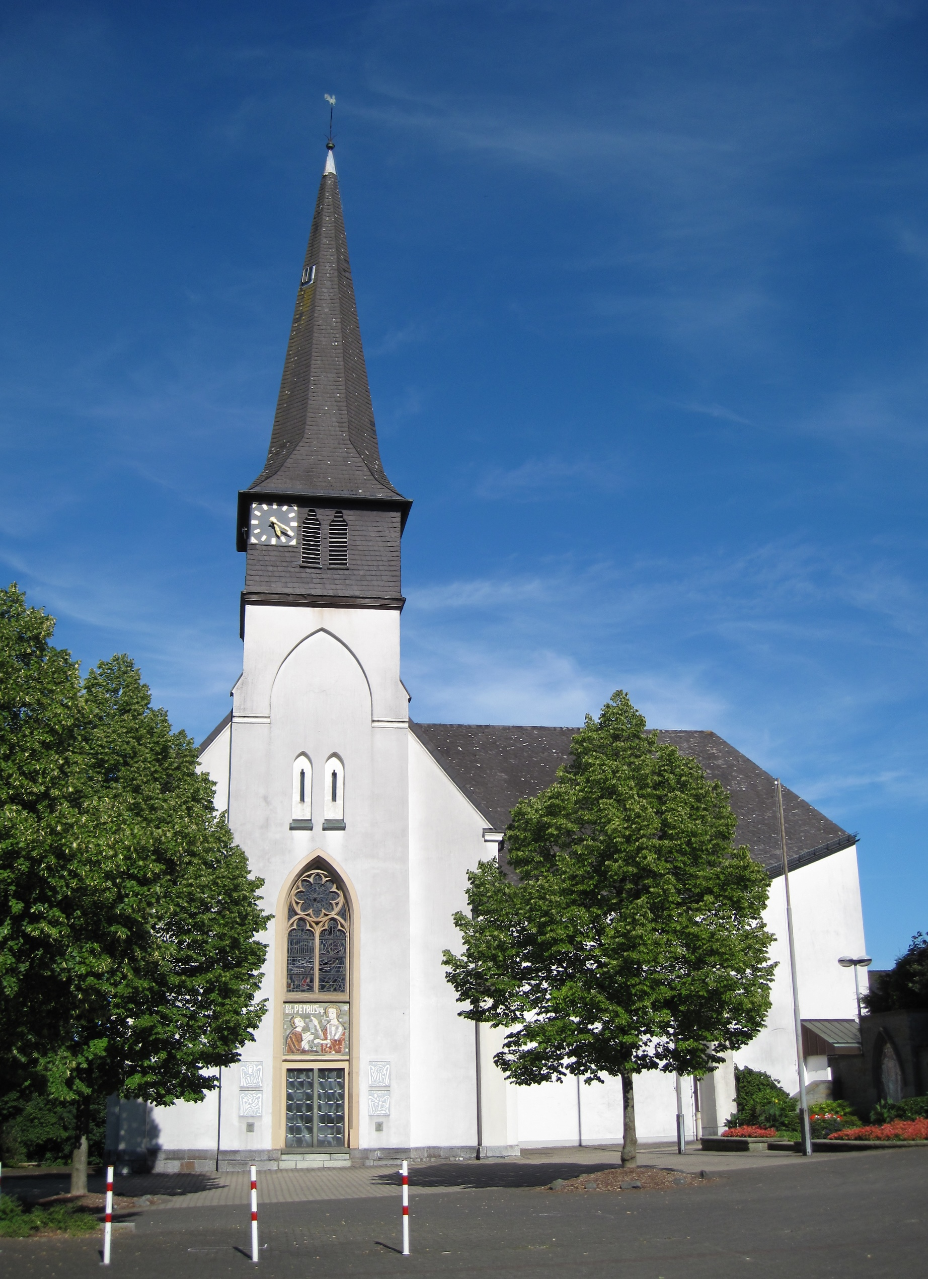 Katholische Kirche St. Vinzenz Echthausen in Wickede (Ruhr)-Echthausen, Kirchplatz 2.